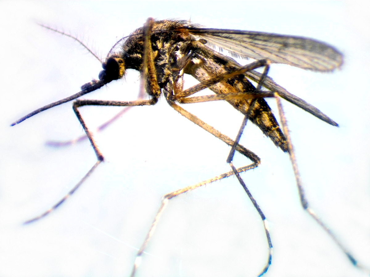 Комар-пискун, или комар обыкновенный (лат. Culex pipiens)